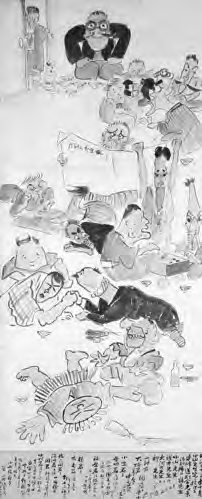 送別図第6幅